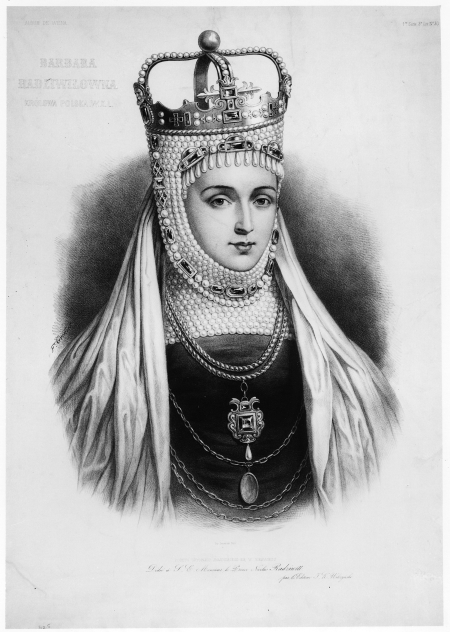 Perły królowej Barbary Radziwiłłówny